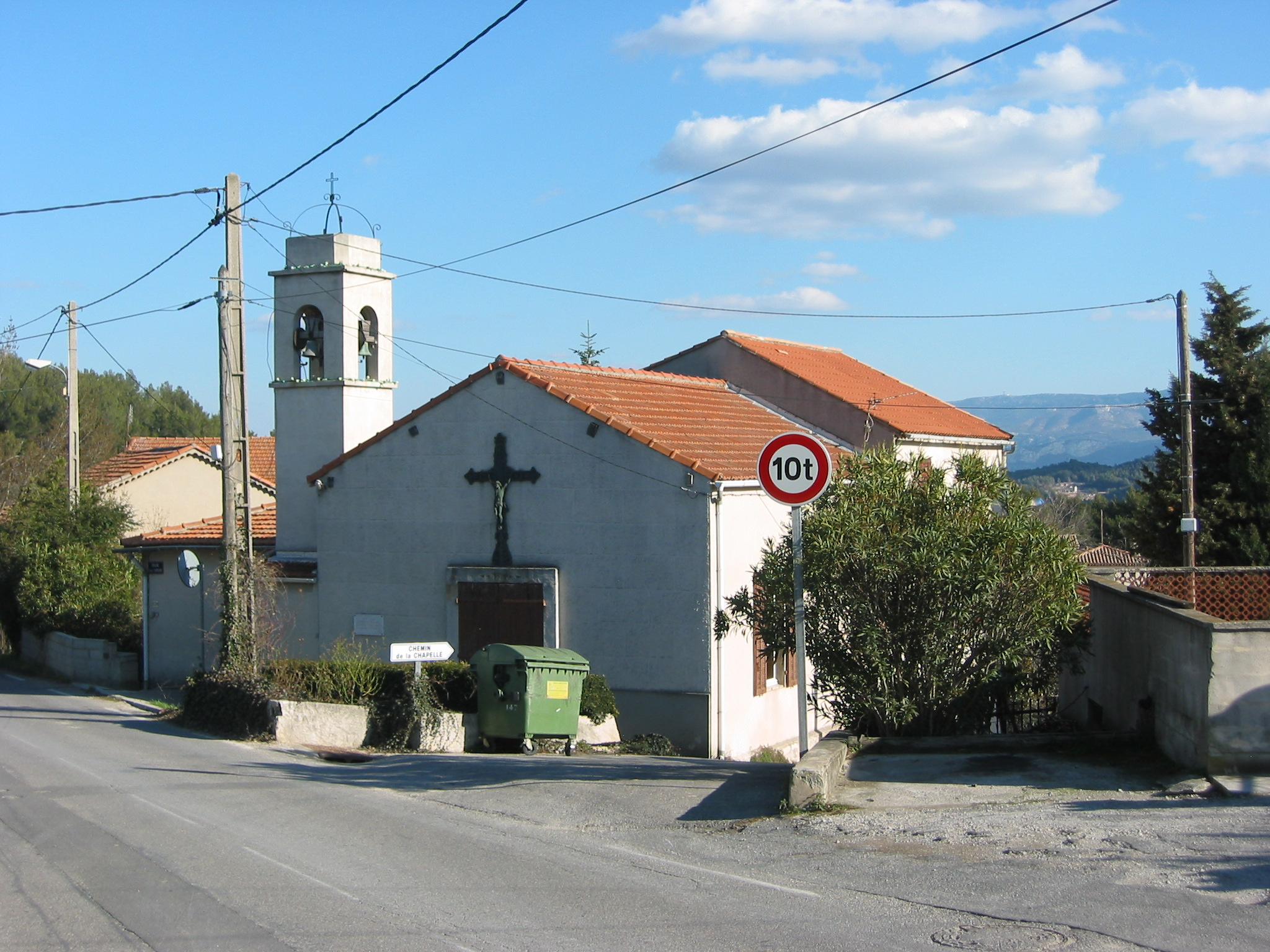 La chapelle Saint Jean Bosco de La Valentine (commune de Saint-Savournin, Bouches-du-Rhône, France). Photo prise le 1er mars 2006. Auteur : Ludovic Ruat (utilisateur:civodule)